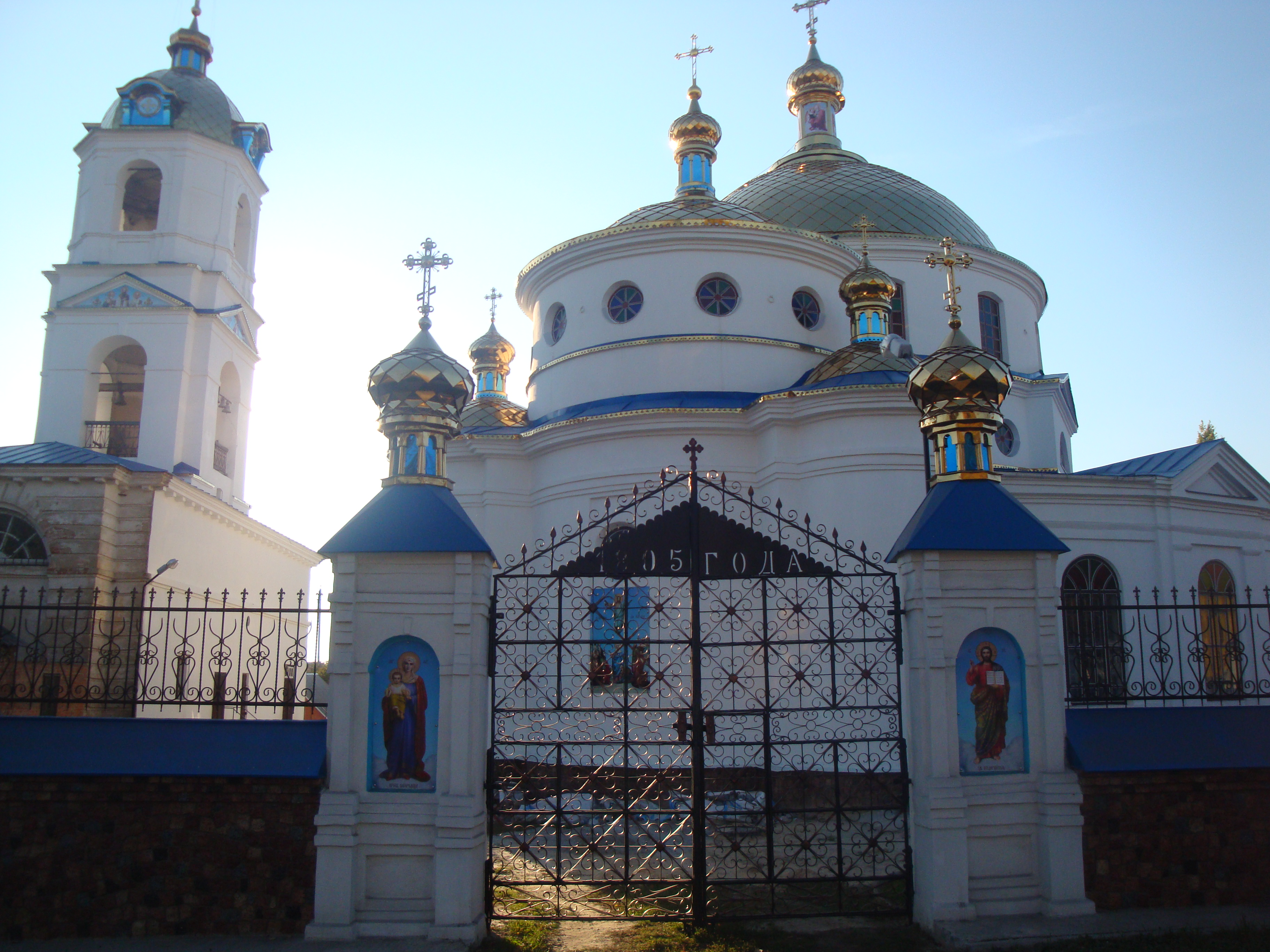 Вознесенська церква та дзвіниця (мур.), Ромни, вул. Соборна, 16